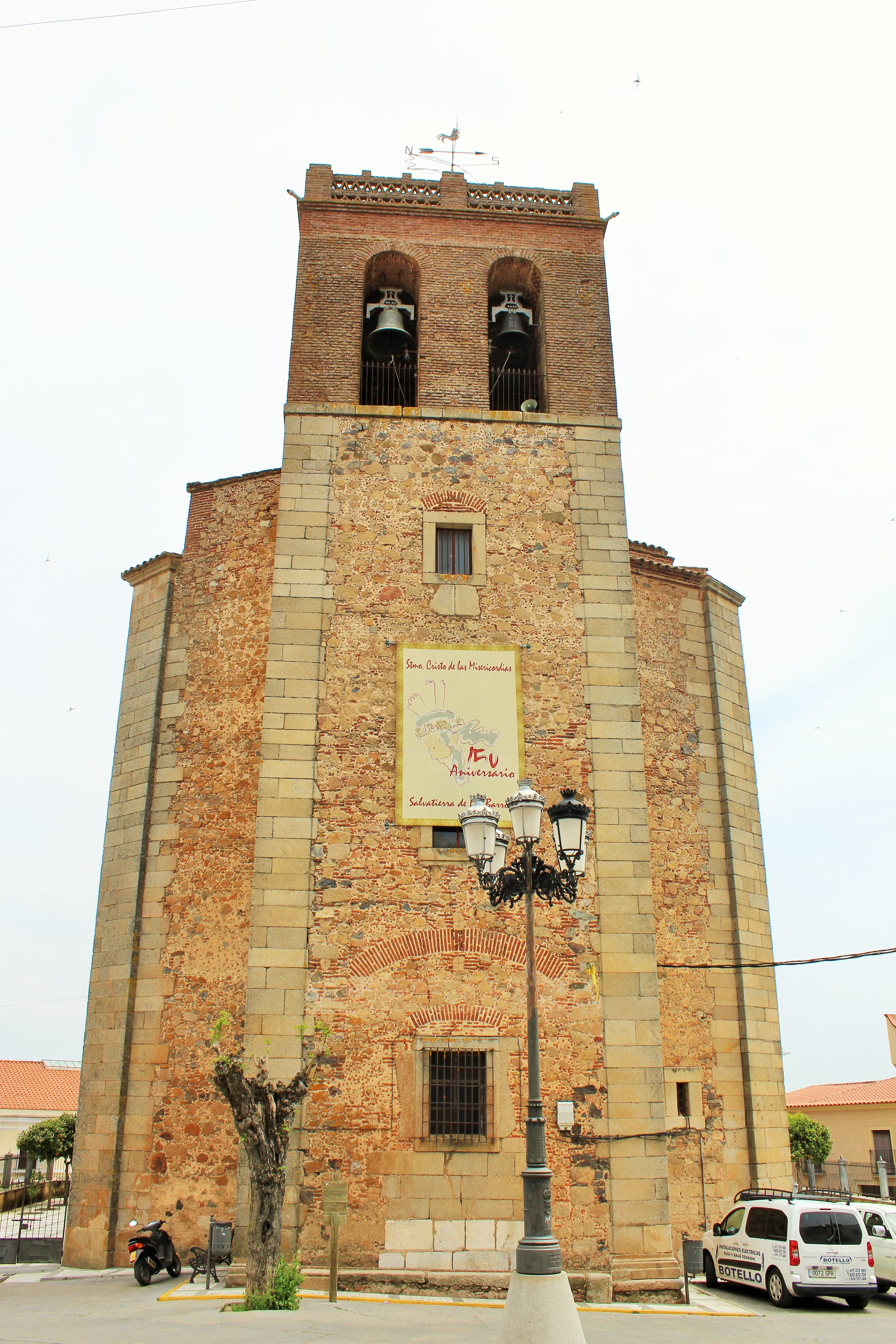 Iglesia de San Blas. Fachada principal.